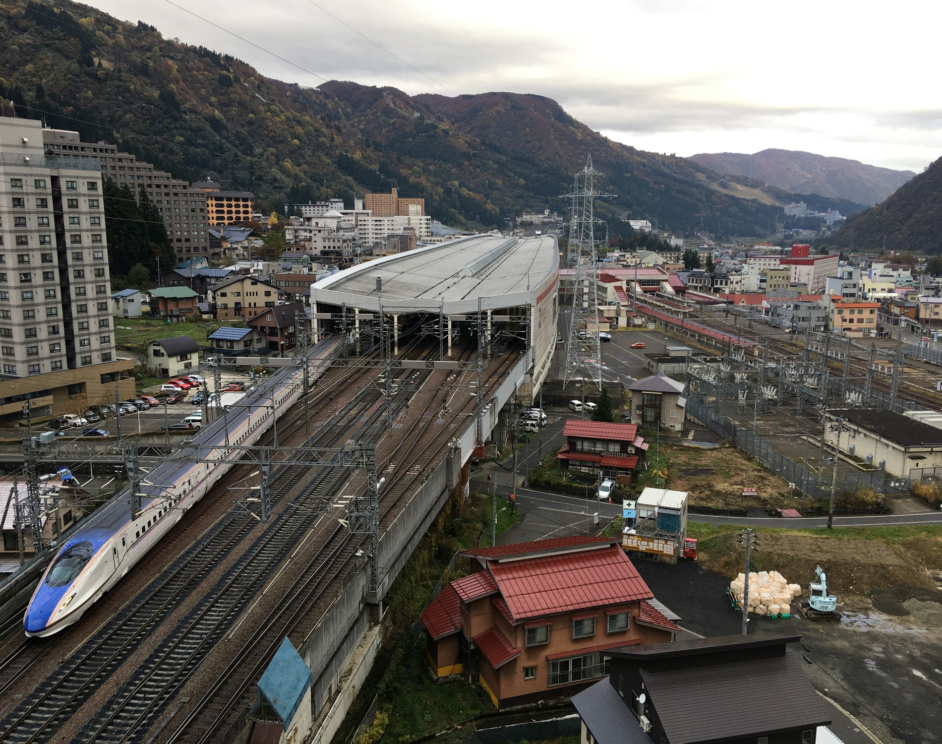 スポーリア湯沢より撮影